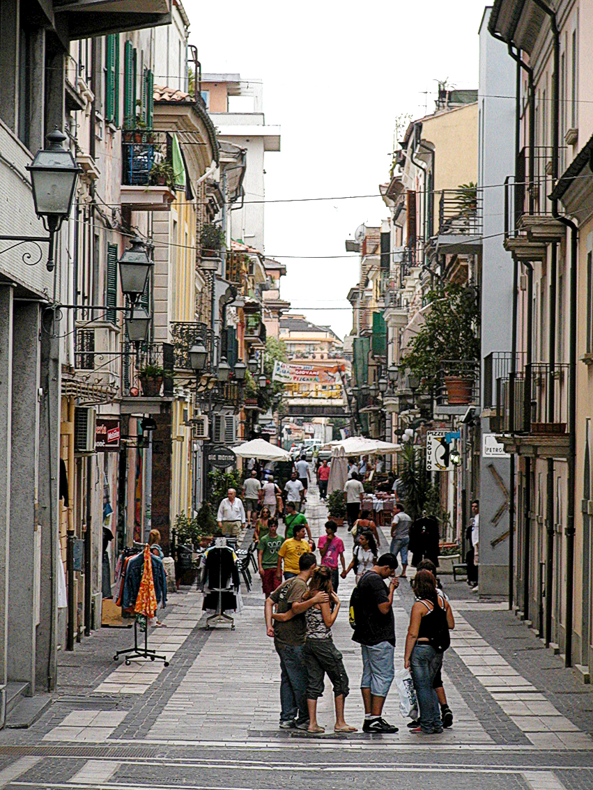 Pescara Centro Storico